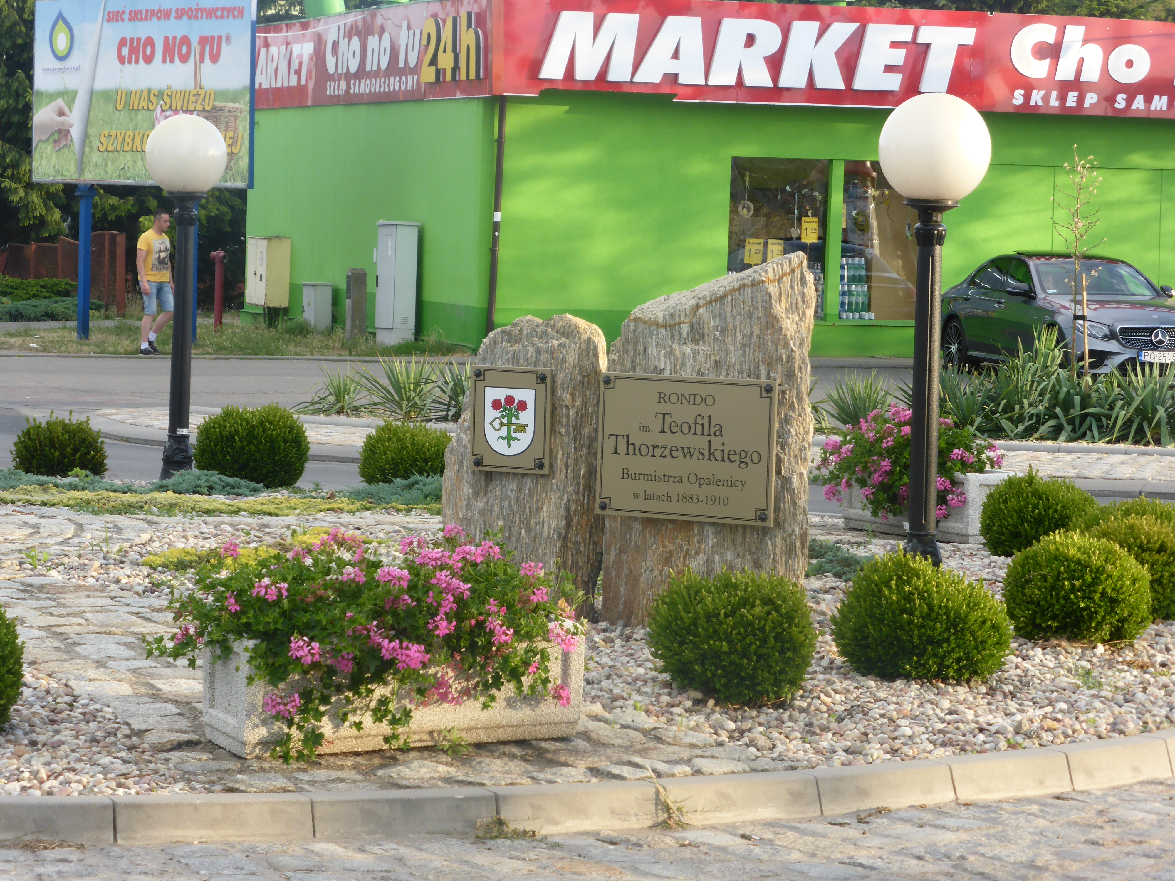 Tablica pamiątkowa Teofila Thorzewskiego na rondzie jego imienia w Opalenicy